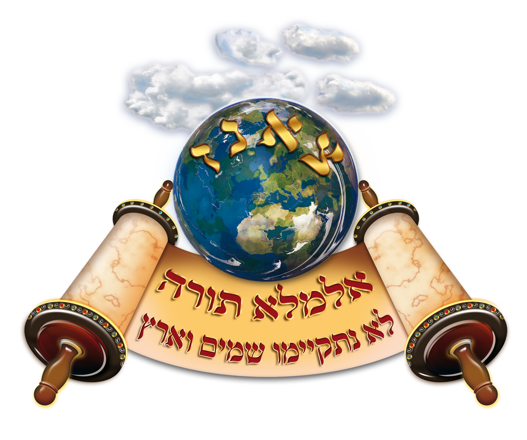 לוגו חסידות צאנז - בצבע